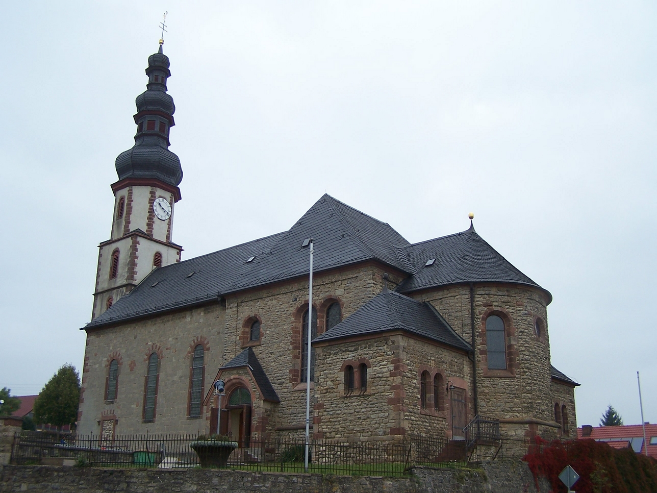 Ansicht der Kirche in Geismar.